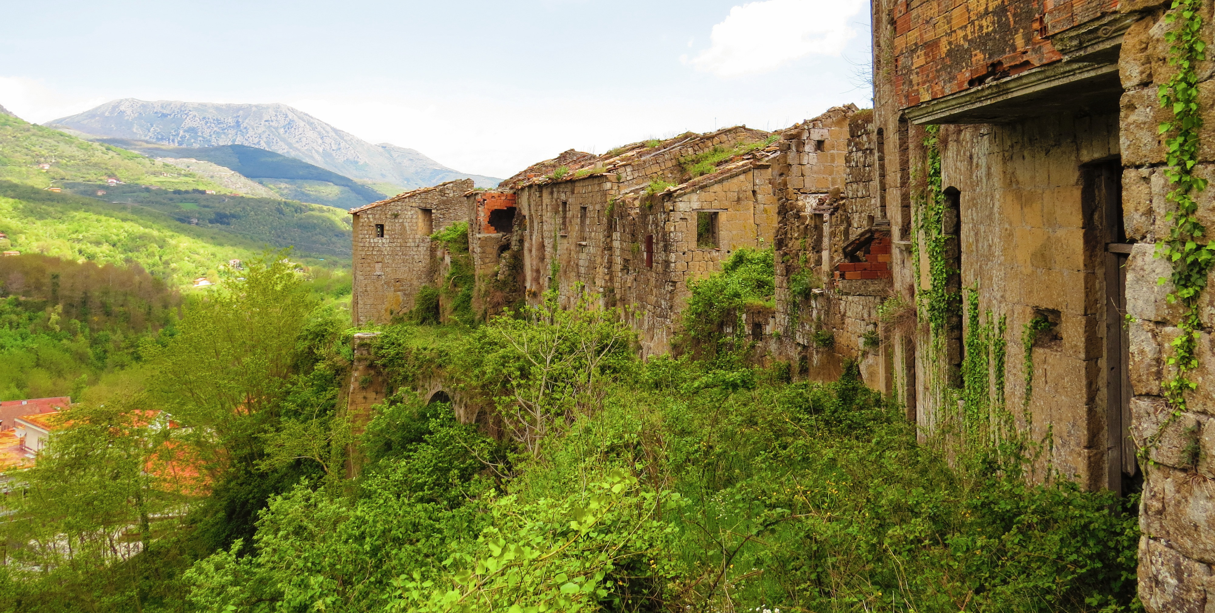 Il centro storico abbandonato di Tocco Caudio (BN)